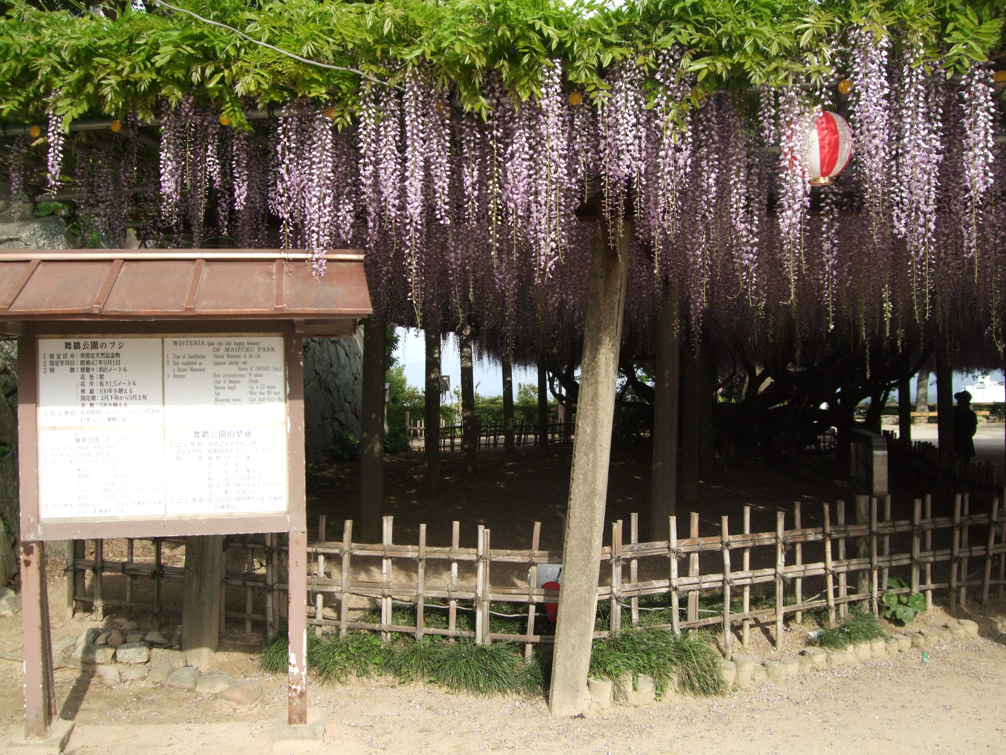 a wisteria in Karatsu castle, Saga, Japan